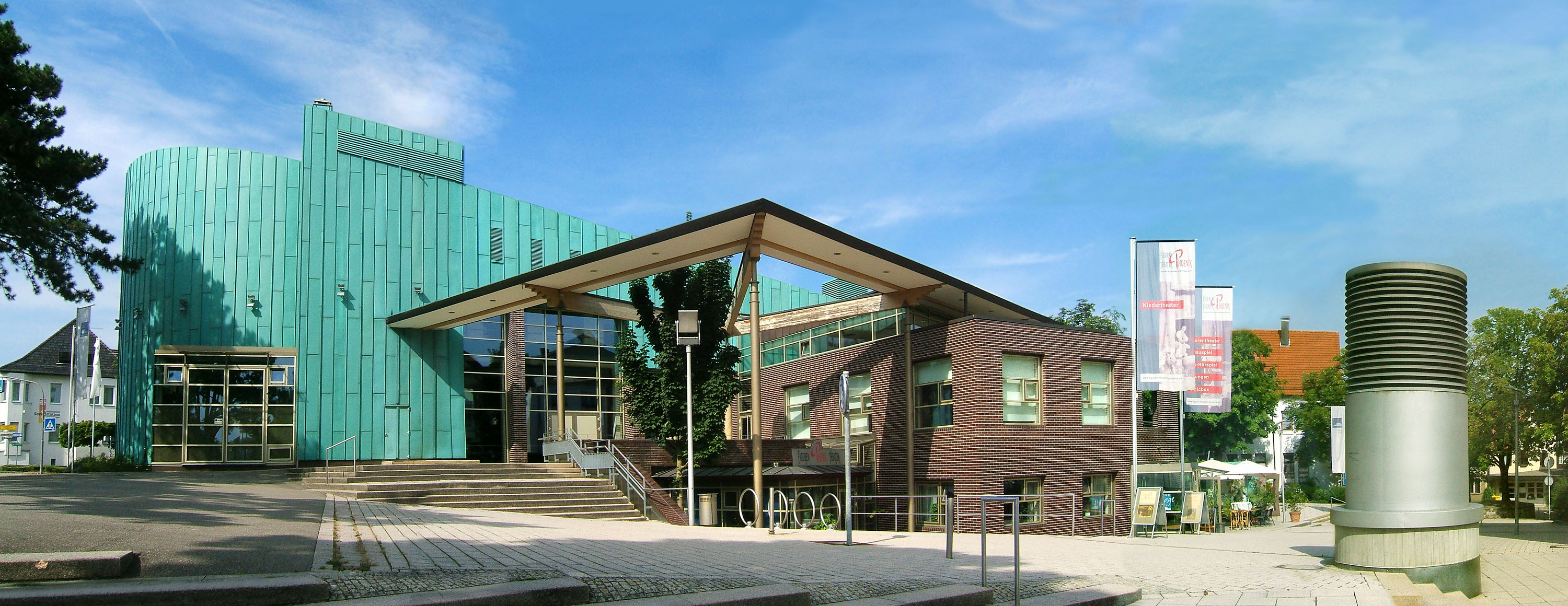 Schorndorf, Deutschland, Künkelinhalle